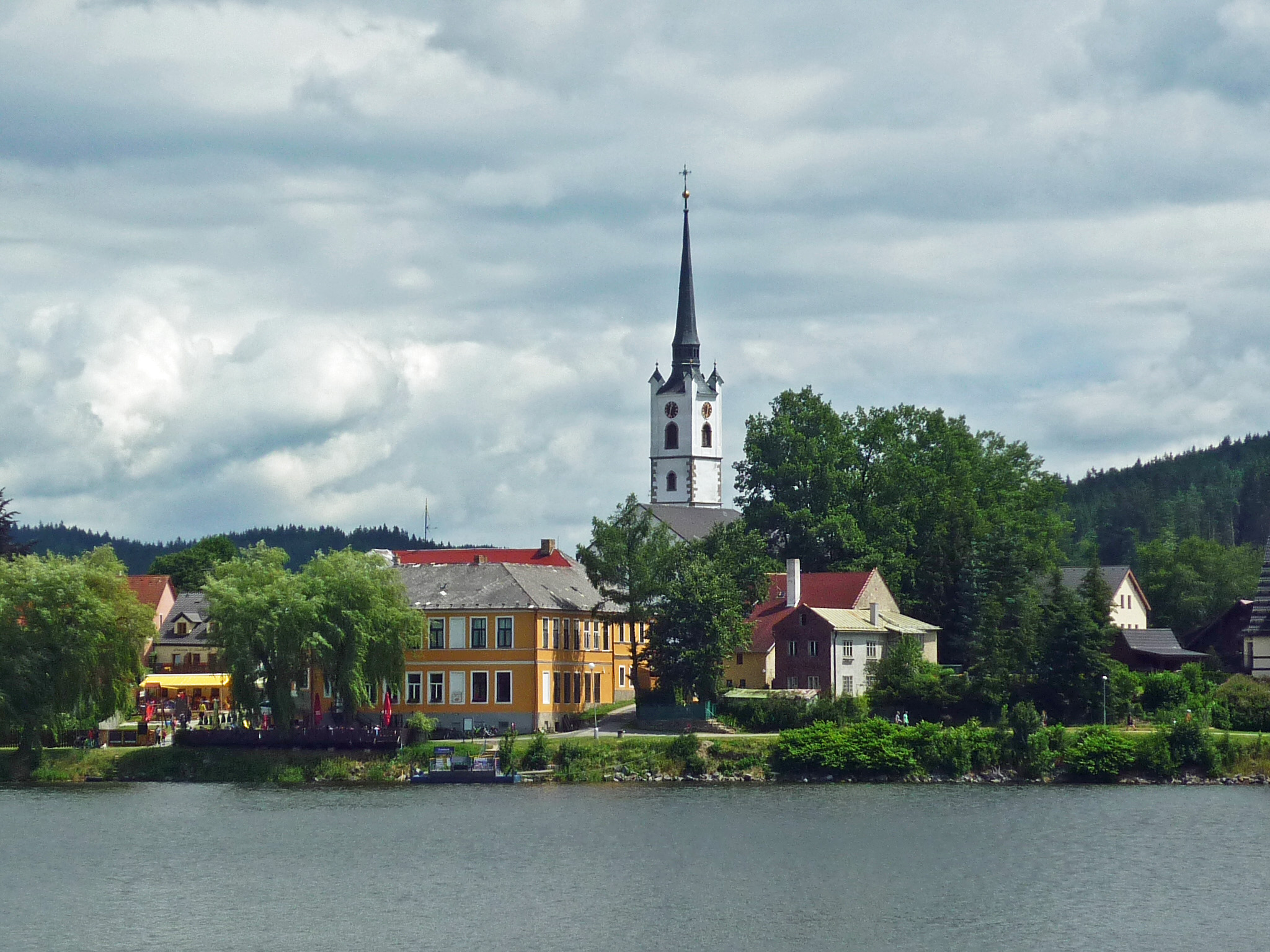 Blick auf Friedberg (Frymburk) in Südböhmen